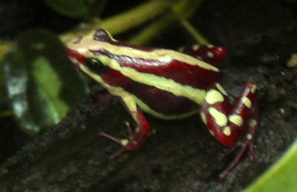 Epipedobates anthonyi - Botanischer Garten Leipzig